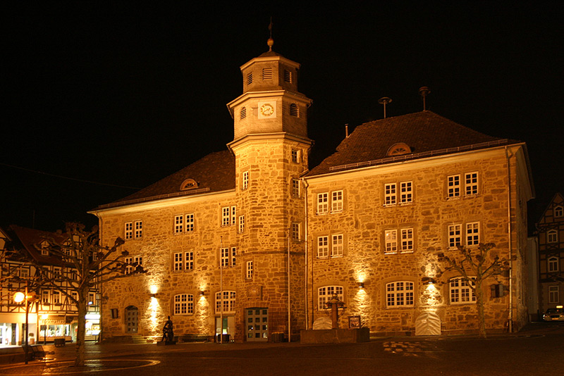 Rathaus Witzenhausen, Hessen, Deutschland. (Original text: Das historische Rathaus der Stadt Witzenhausen)